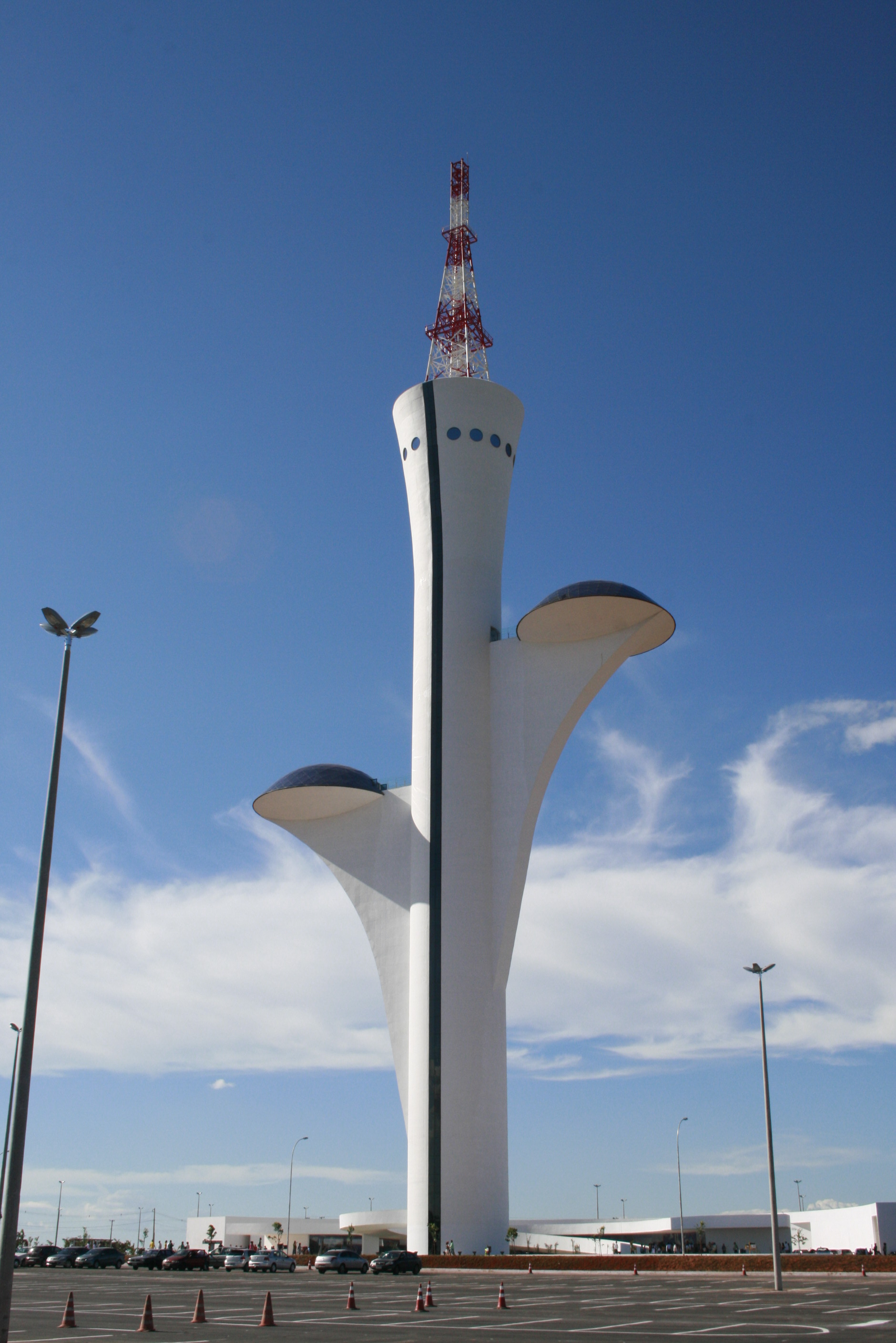 Torre de TV Digital em Sobradinho, DF, Brasil